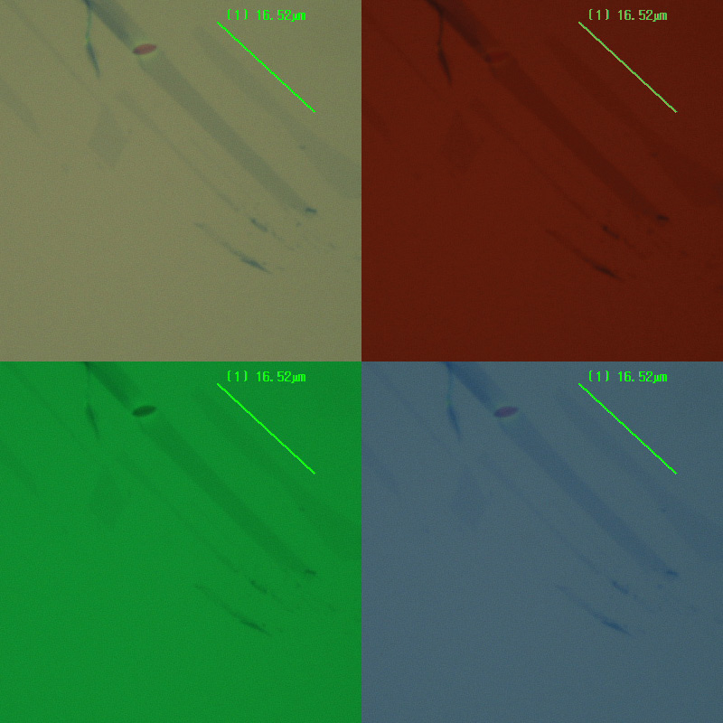 Graphene optical visibility on Si/SiO2 substrate in white light. Other pictures are taken using red, blue, and green filters.